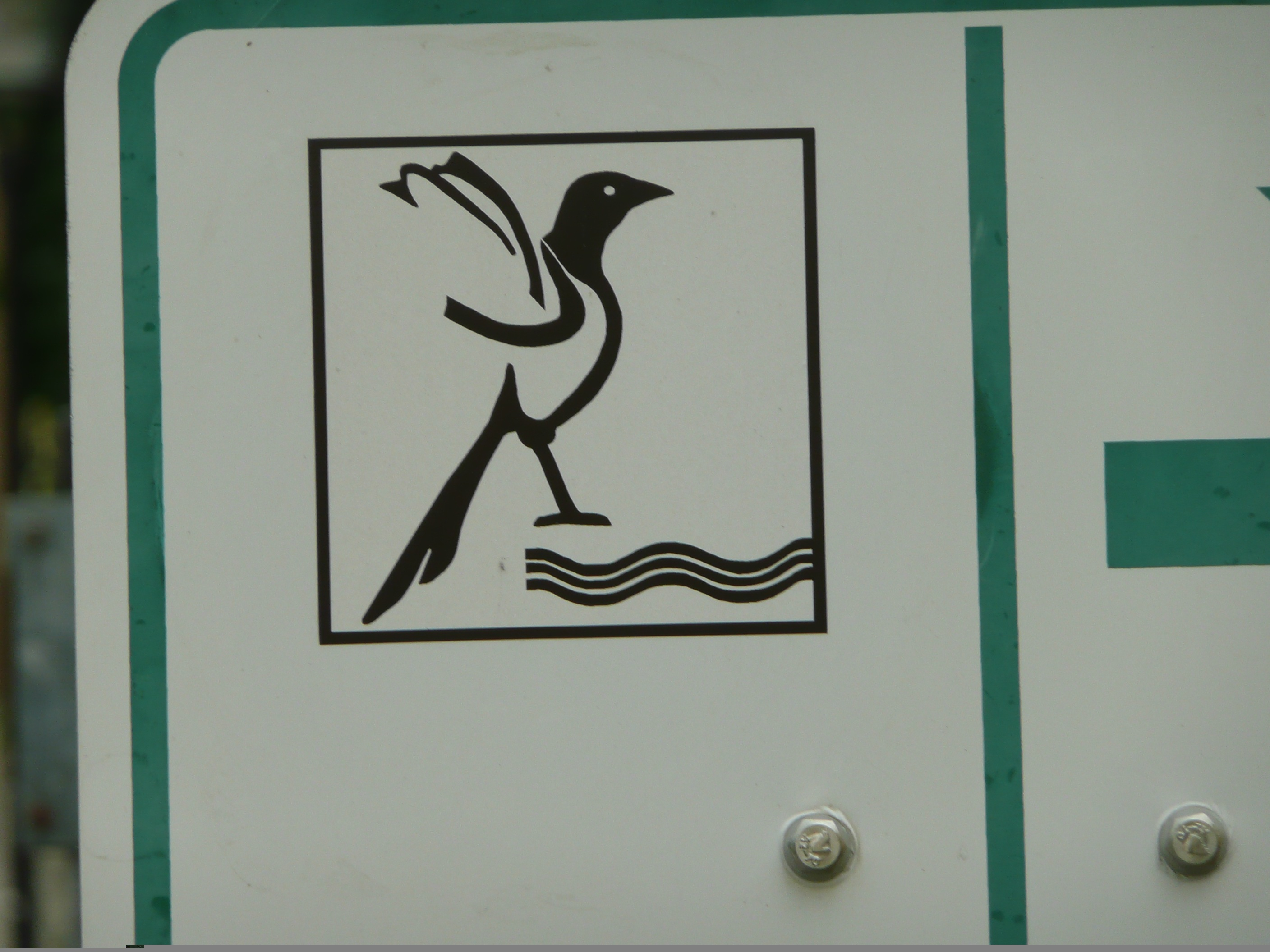 Logo des Schwarze-Elster-Radweges